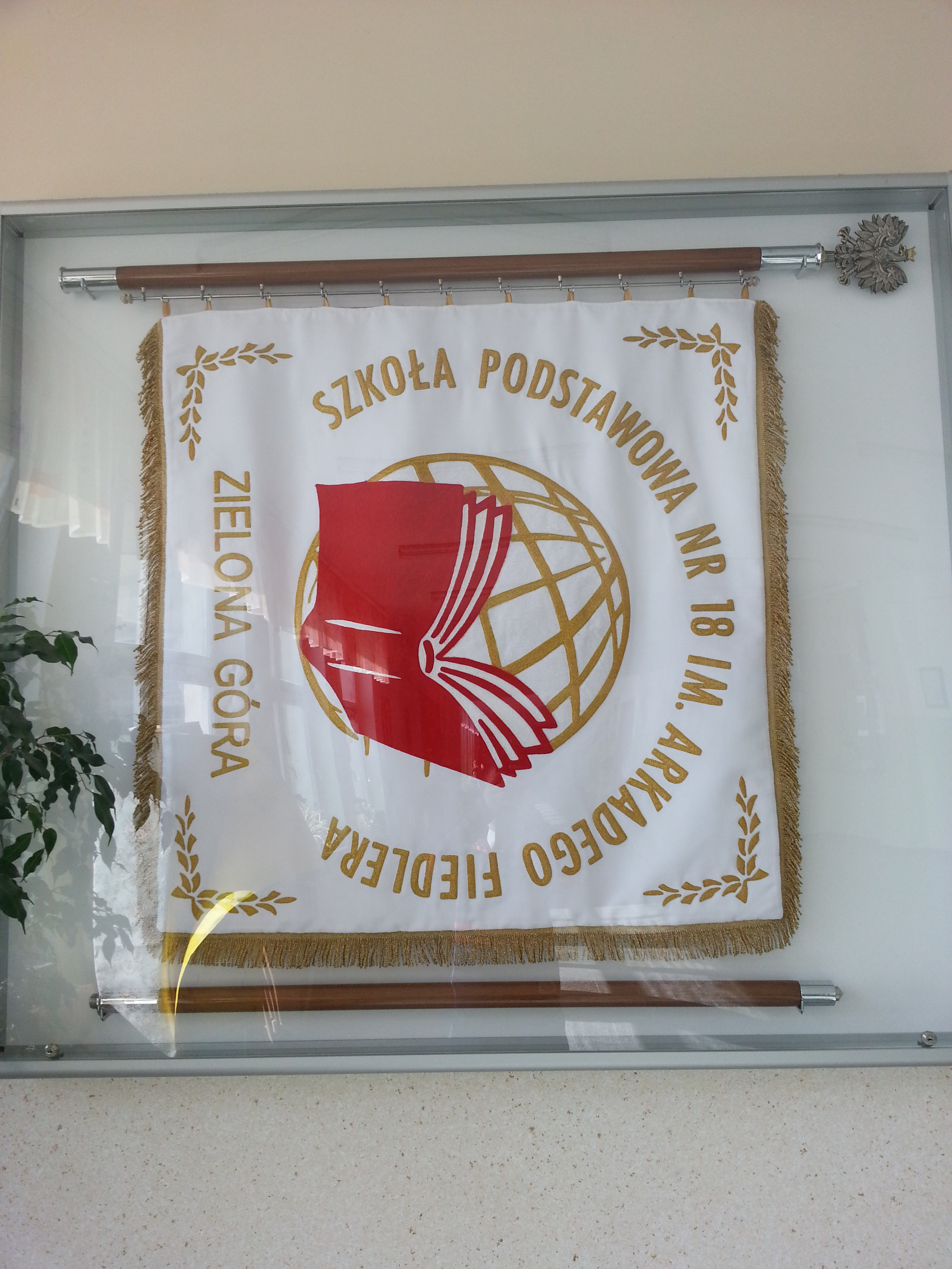 Szandar SP18 w Zielonej Górze